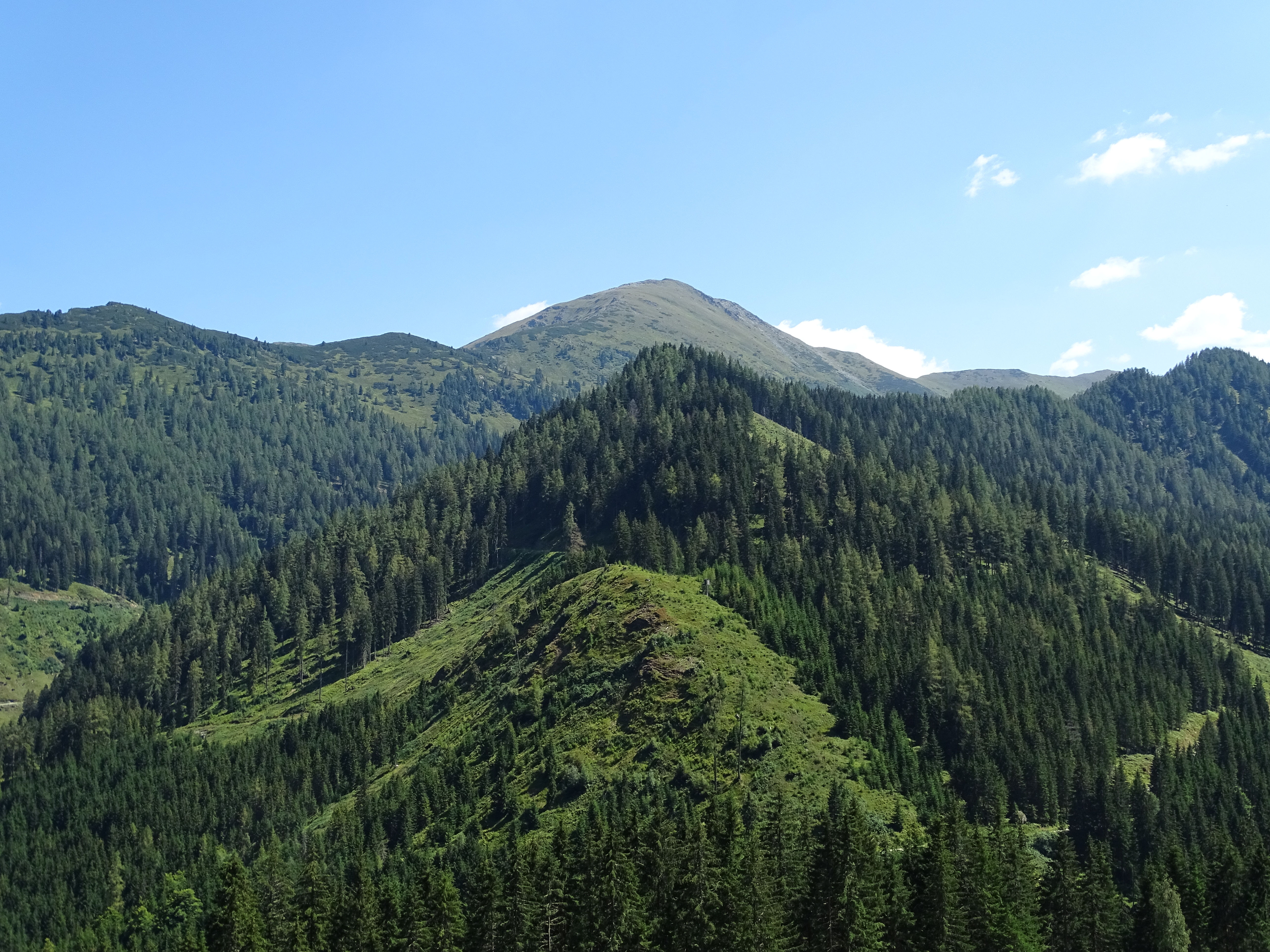 Der Hochrettelstein an der Gemeindegrenze zwischen Aigen im Ennstal und Rottenmann.